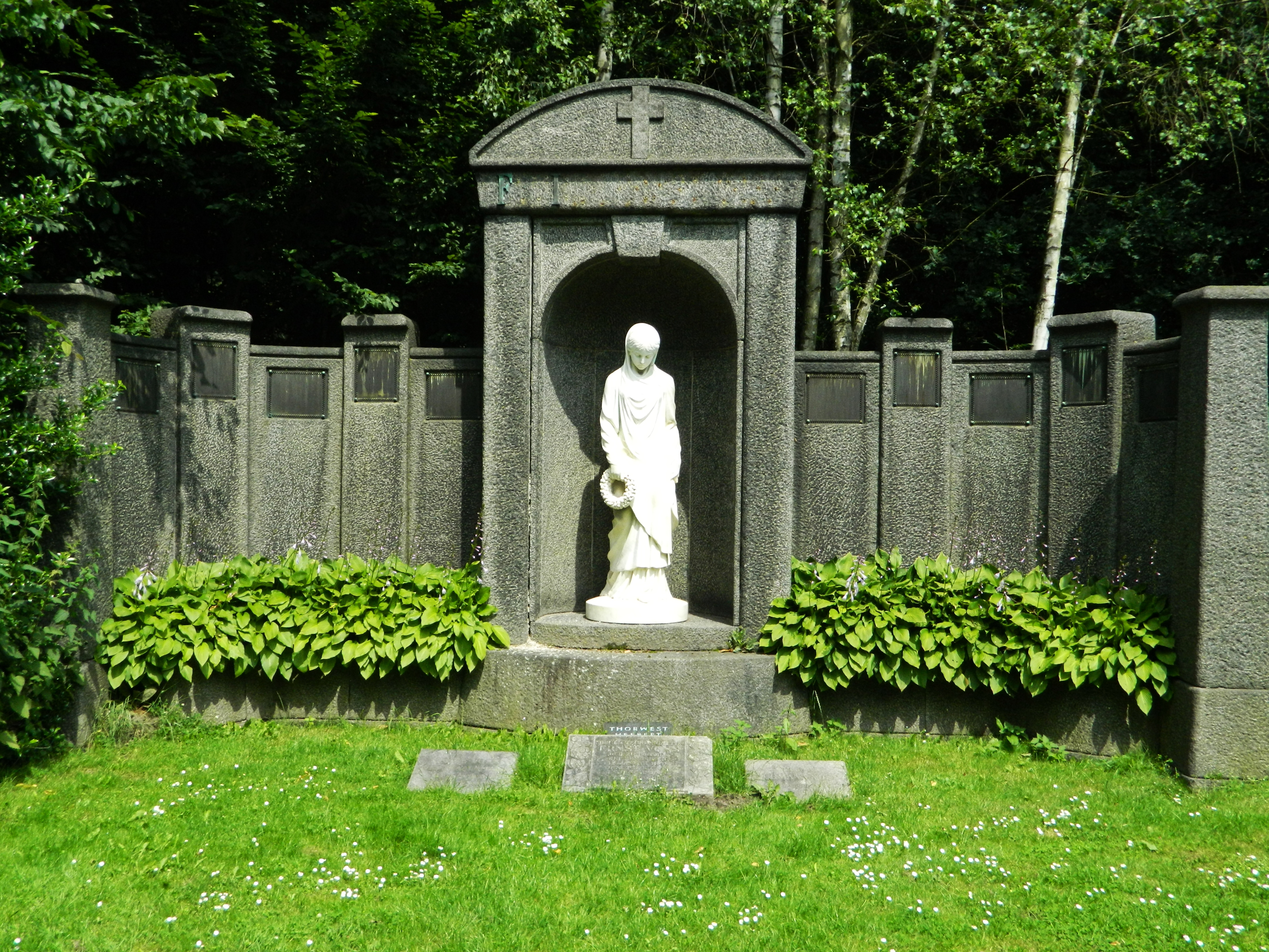 Grave (1907) by German sculptor Julius Moser, Hamburg cemetery Friedhof Ohlsdorf, map P 8, for Voss family.Details see Barbara Leisner, Heiko K. L. Schulze, Ellen Thormann: Der Hamburger Hauptfriedhof Ohlsdorf. Geschichte und Grabmäler. 2 Bände und eine Übersichtskarte 1:4000. Hans Christians, Hamburg 1990, ISBN 3-7672-1060-6, page 77, Kat. 461.